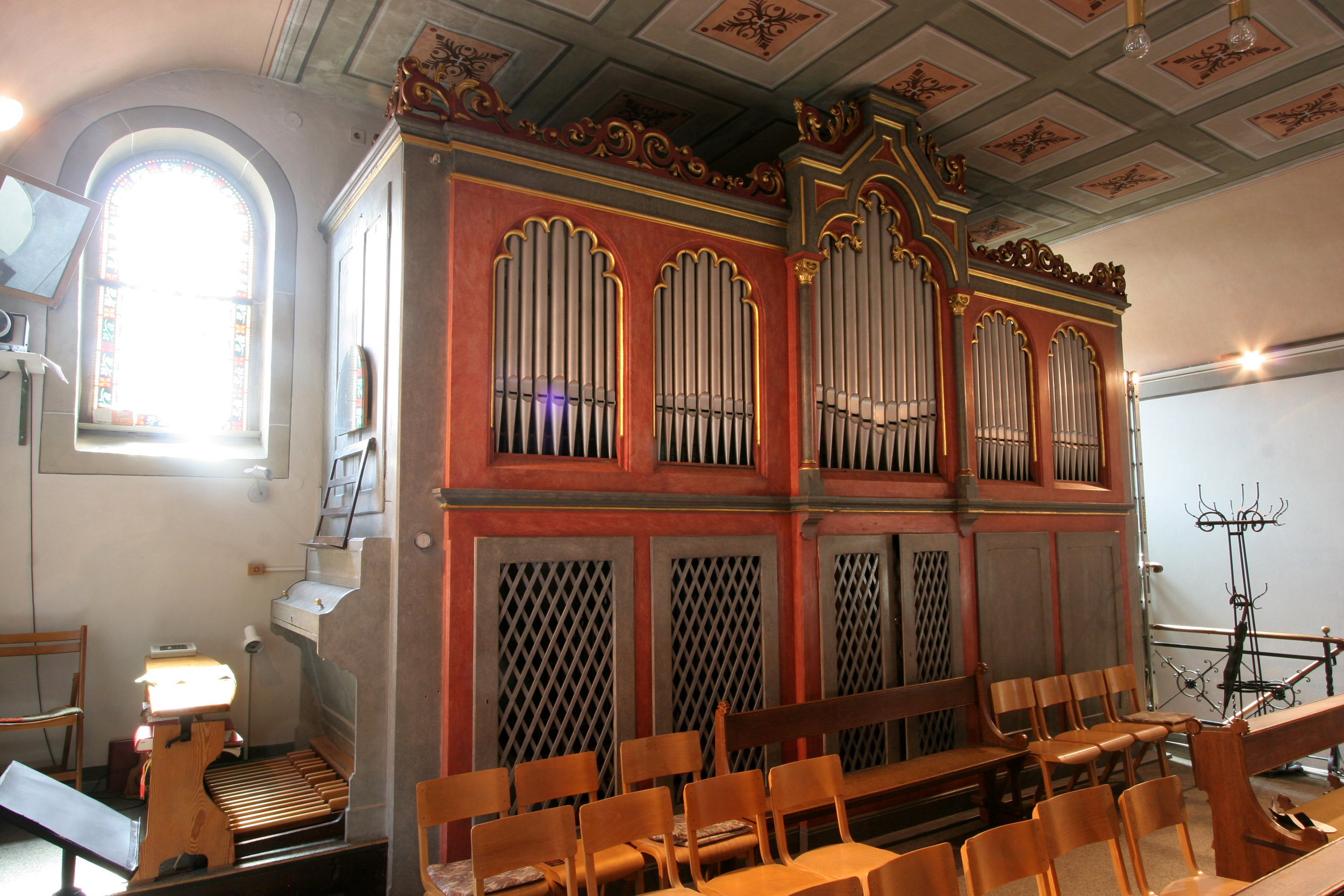 Orgel der Kirche St. Andreas aus Klein-Winternheim (Rheimhessen), gebaut von Martin Schlimbach